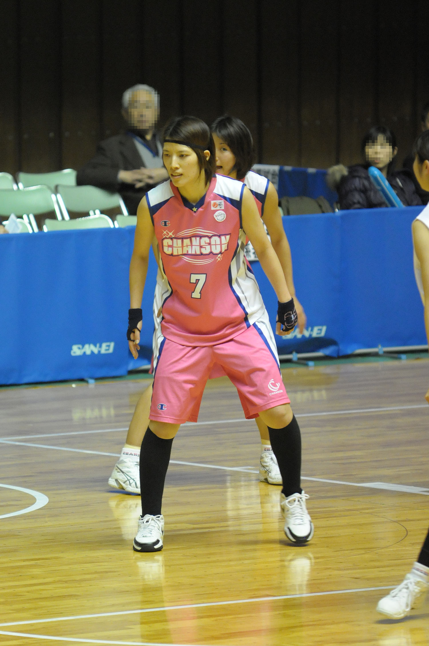 シャンソンVマジックの渡辺由夏選手。とどろきアリーナで。